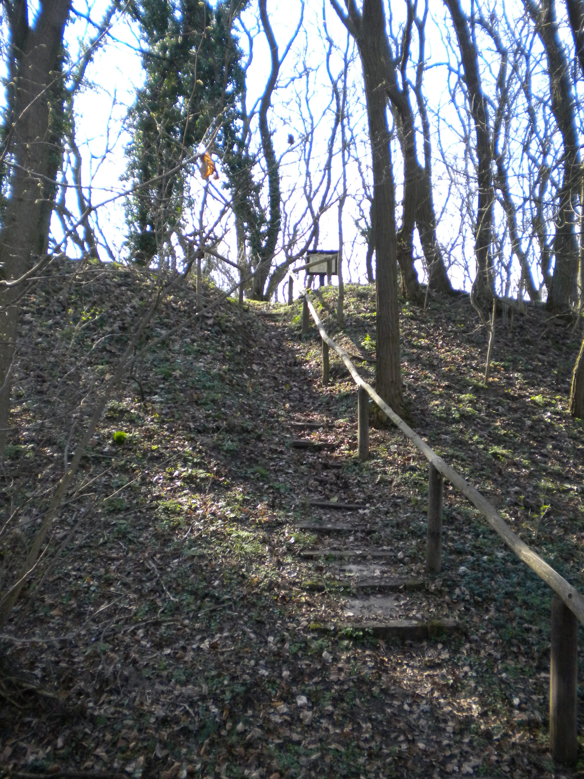 Volksburg der Slawen und mittelalterliche Burg